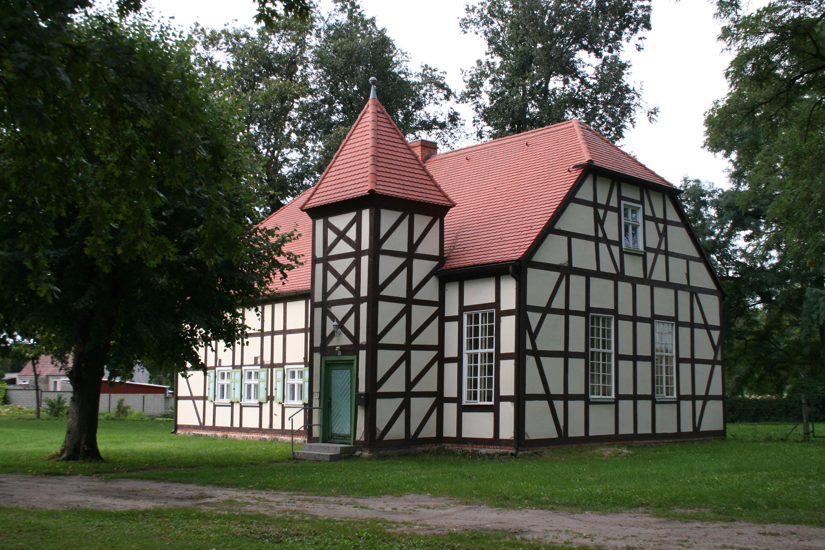 Schul- und Bethaus Alttrebbin, Dorfstr. 2, Alttrebbin, Gemeinde Neutrebbin, Brandenburg